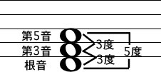 三和音の構成音